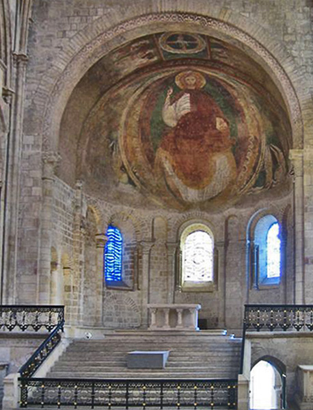 Kathedrale von Nevers, Westchor